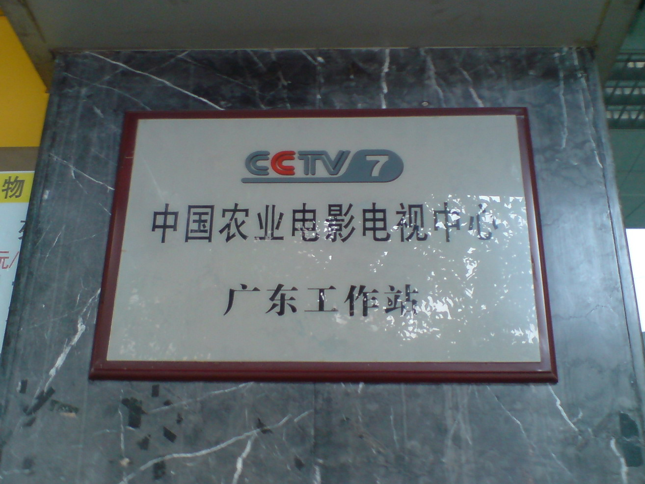 中文（中国大陆）: 中国农业电影电视中心（CCTV-7）广东工作站，位于中国大陆广东省广州市越秀区东华东路413号广东省农业展览馆大楼3层。